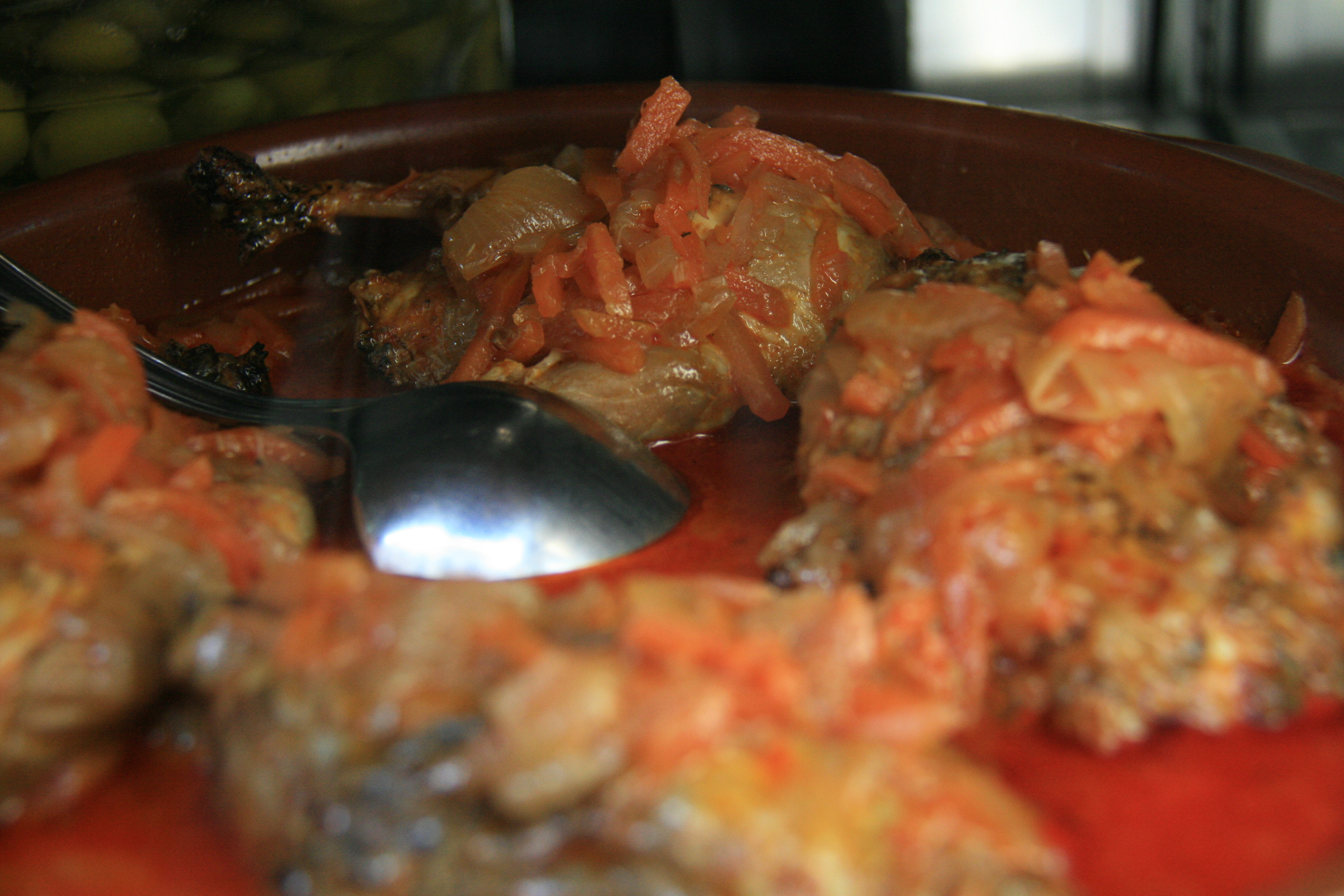 Perdices en escabeche - Madrid (España)